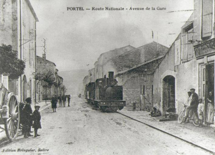 Avenue de la Gare à Portel-des-Corbières